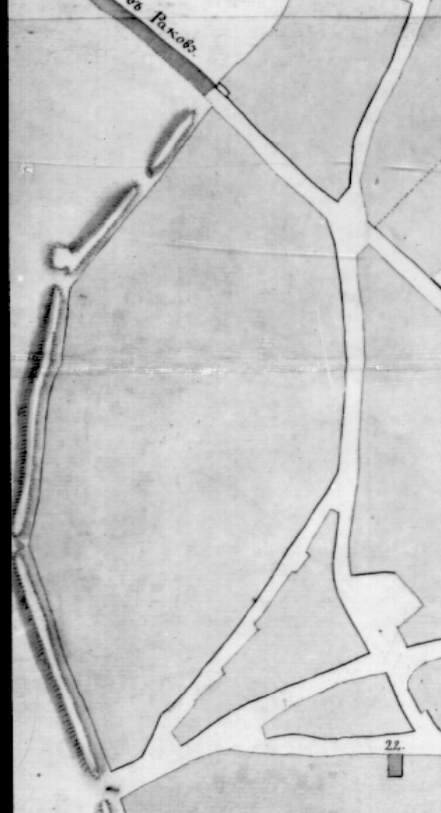 Мінск. План 1793 г. (РДВГА)Беларуская (тарашкевіца): Менск (Miensk). Плян места